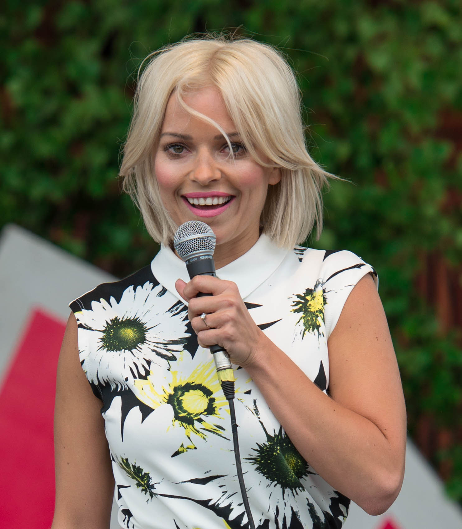 Artisterna för Allsång på Skansen presenteras den 10 juni 2015 på Skansen i Stockholm.